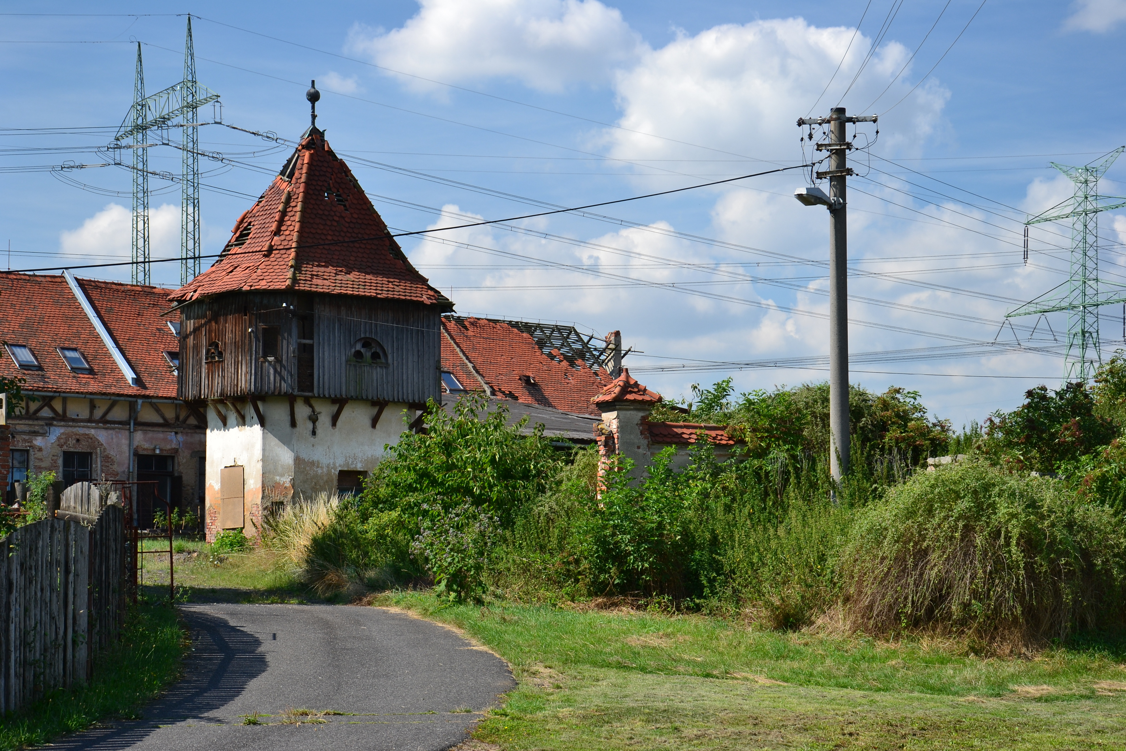 Malé Krhovice - holubník v hospodářském dvoře